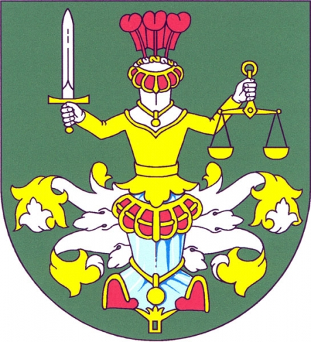 znak, Horní Maršov, okres Trutnov